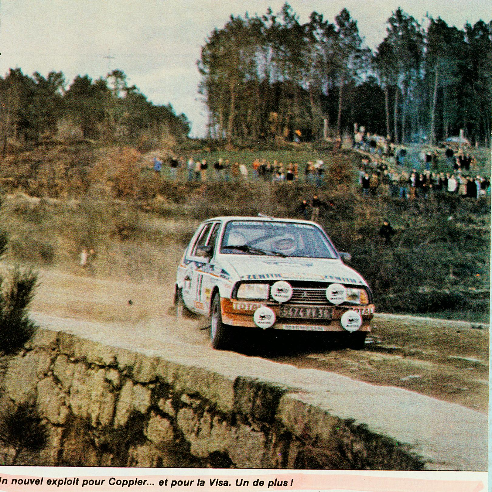 5éme au général et 1er du Groupe B, année de la victoire de Michèle Mouton.